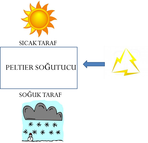 TEMSİLİ BİR PELTIER SOĞUTUCU ÇALIŞMA PRENSİBİ